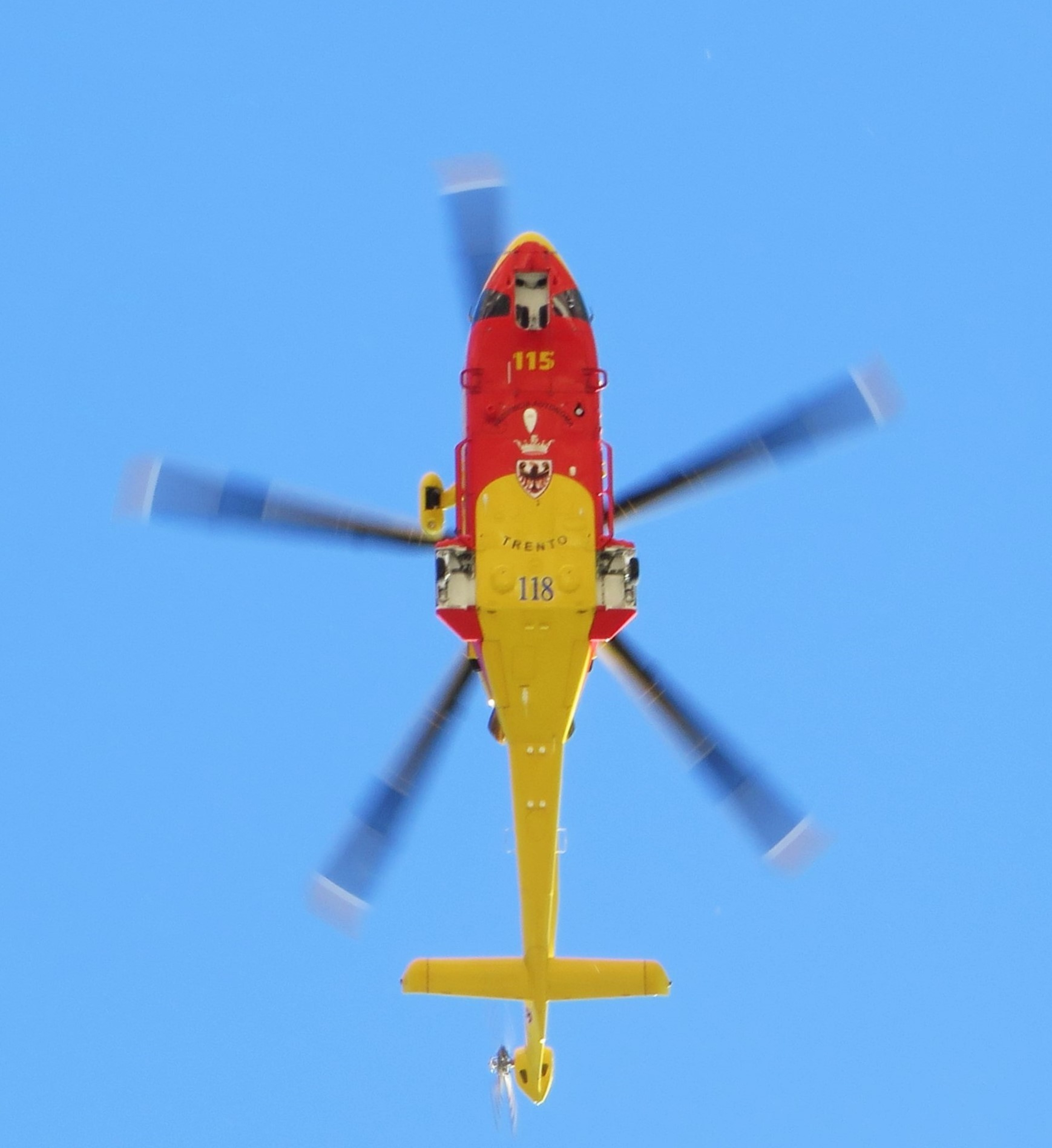 Eliambulanza I-TNDD in volo sopra il campo sportivo comunale Benacense "Pra delle Moneghe" in via Benacense il 5 ottobre 2018